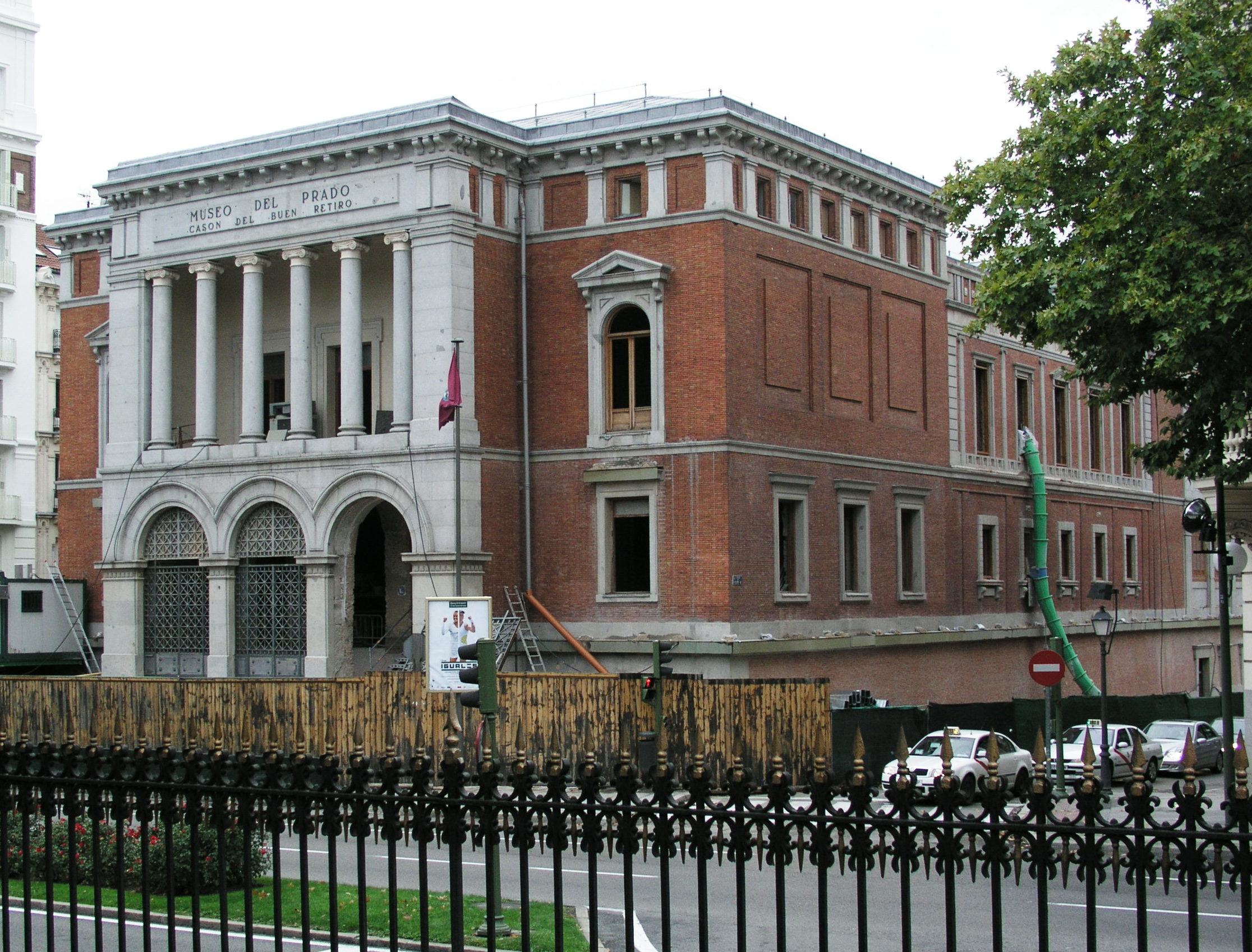 Jardines del Buen Retiro, Madrid, Spain. Cason del Buen Retiro.